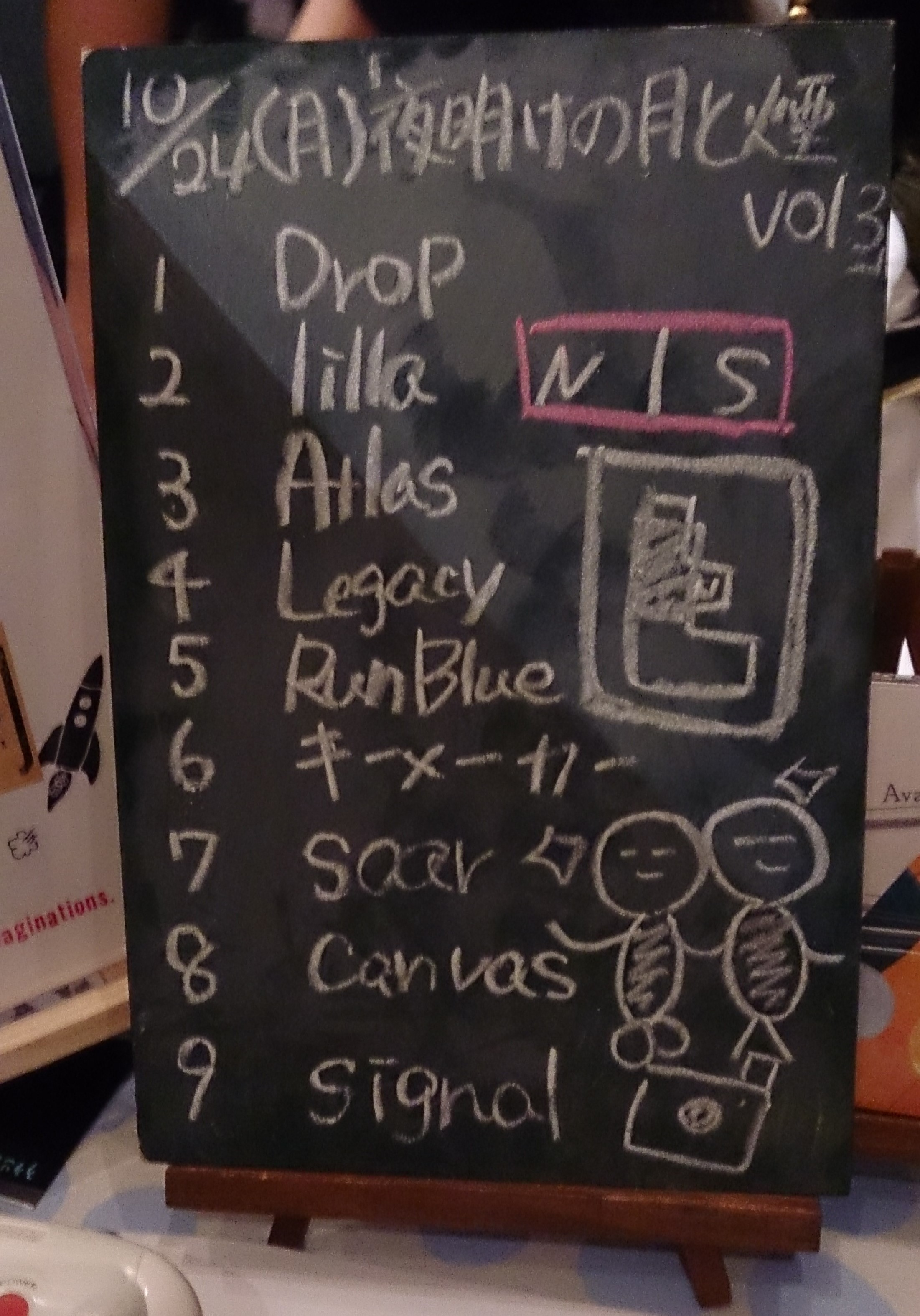 amiinAセトリボード(20161024(1))